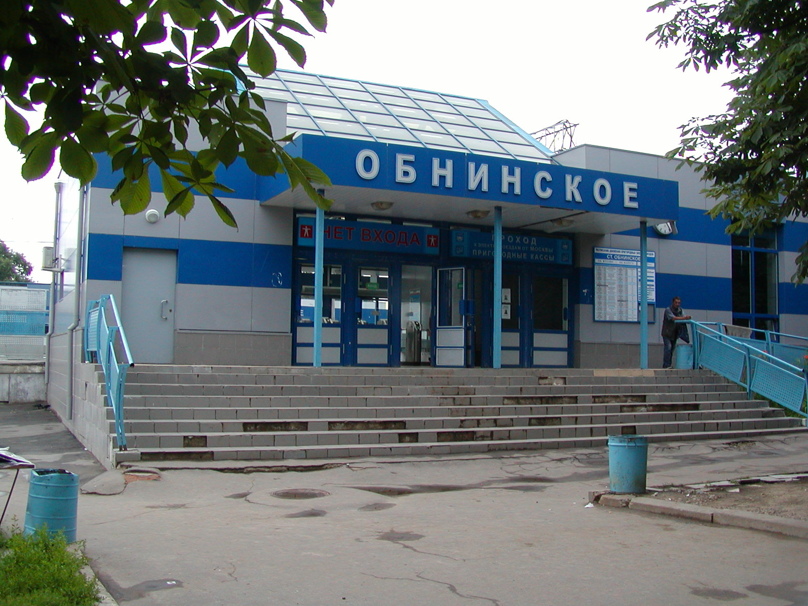 Вход на железнодорожную станцию Обнинское со стороны города Обнинска.